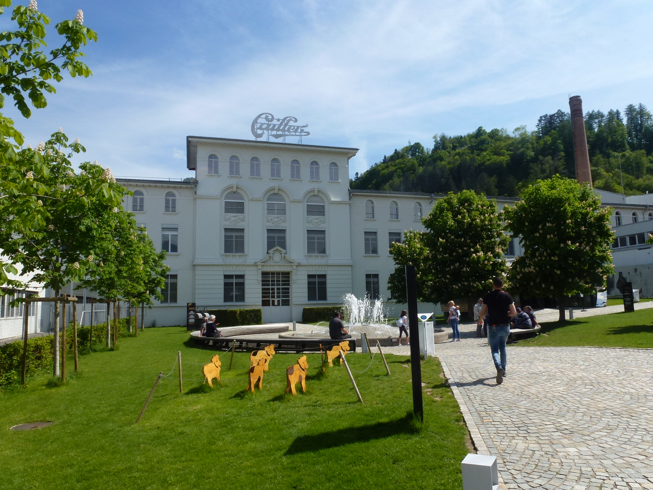 Broc Chocolaterie Maison Cailler Museum